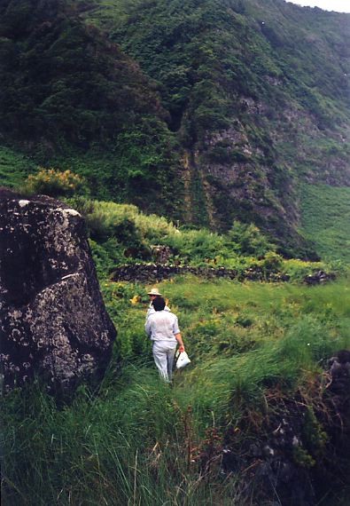 Fajã Vasco Martins, Falésias, Velas, ilha de São Jorge, Açores, Portugal.